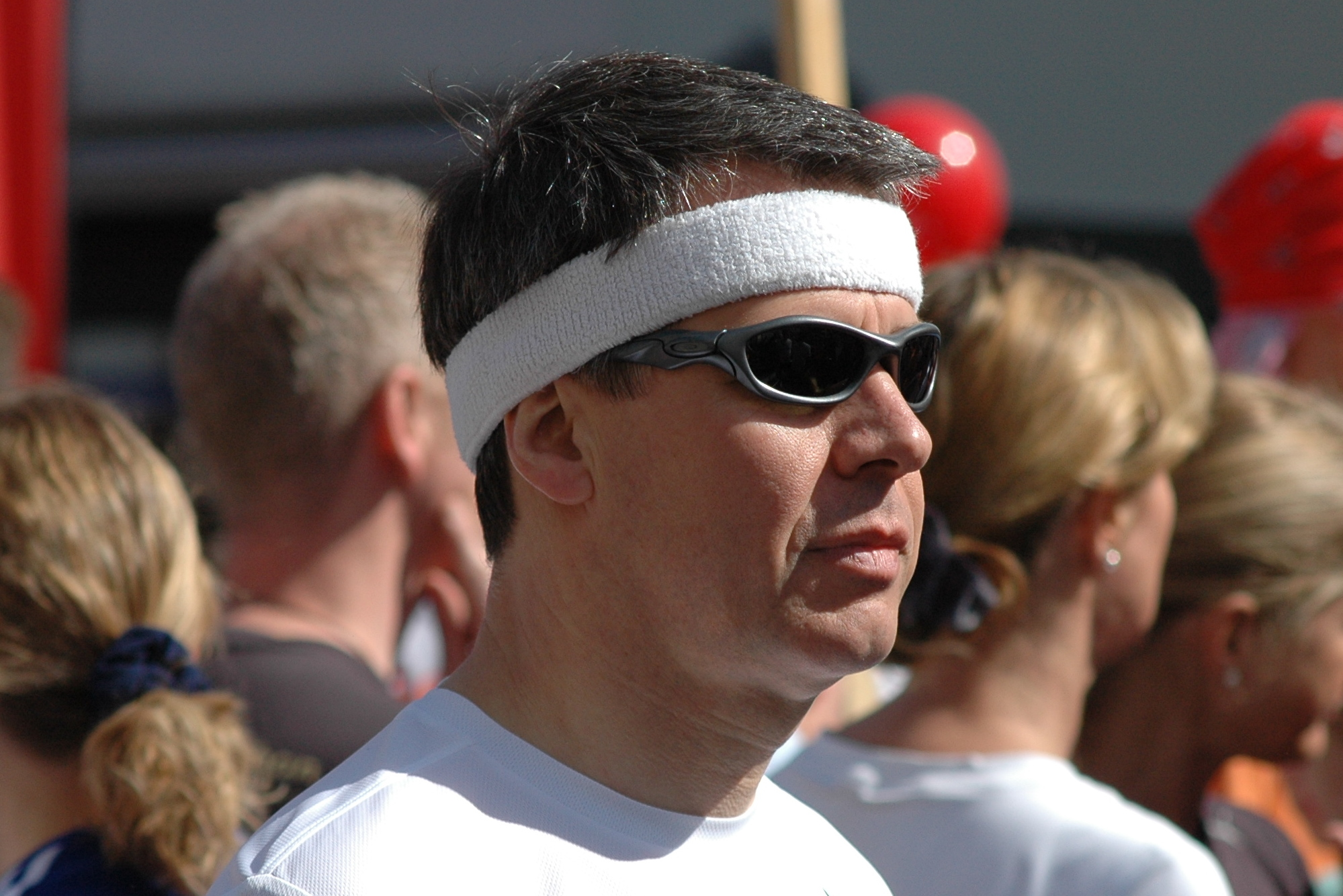 RTL-Chefredakteur Peter Kloeppel vor dem Start des Bonn-Marathons 2007